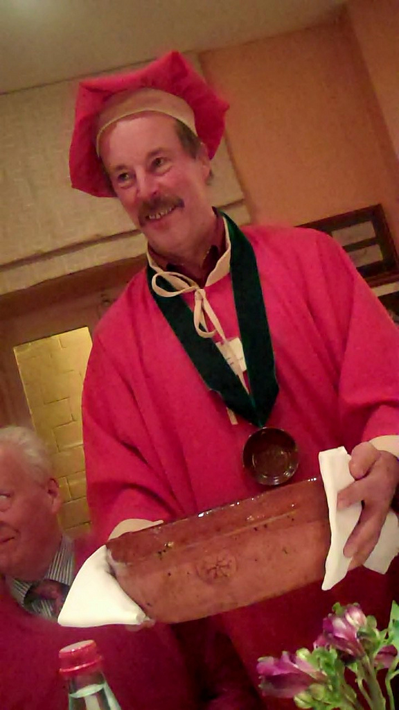 Cassoulet servi par la confrérie de l'Académie Universelle du Cassoulet